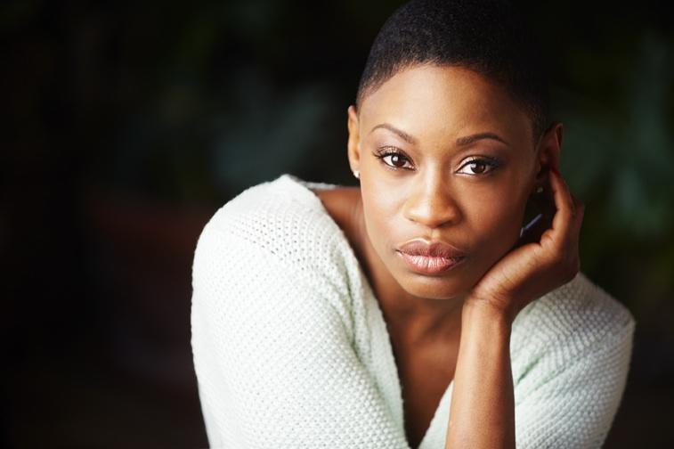 Depicted person: Oluniké Adeliyi – Canadian actress